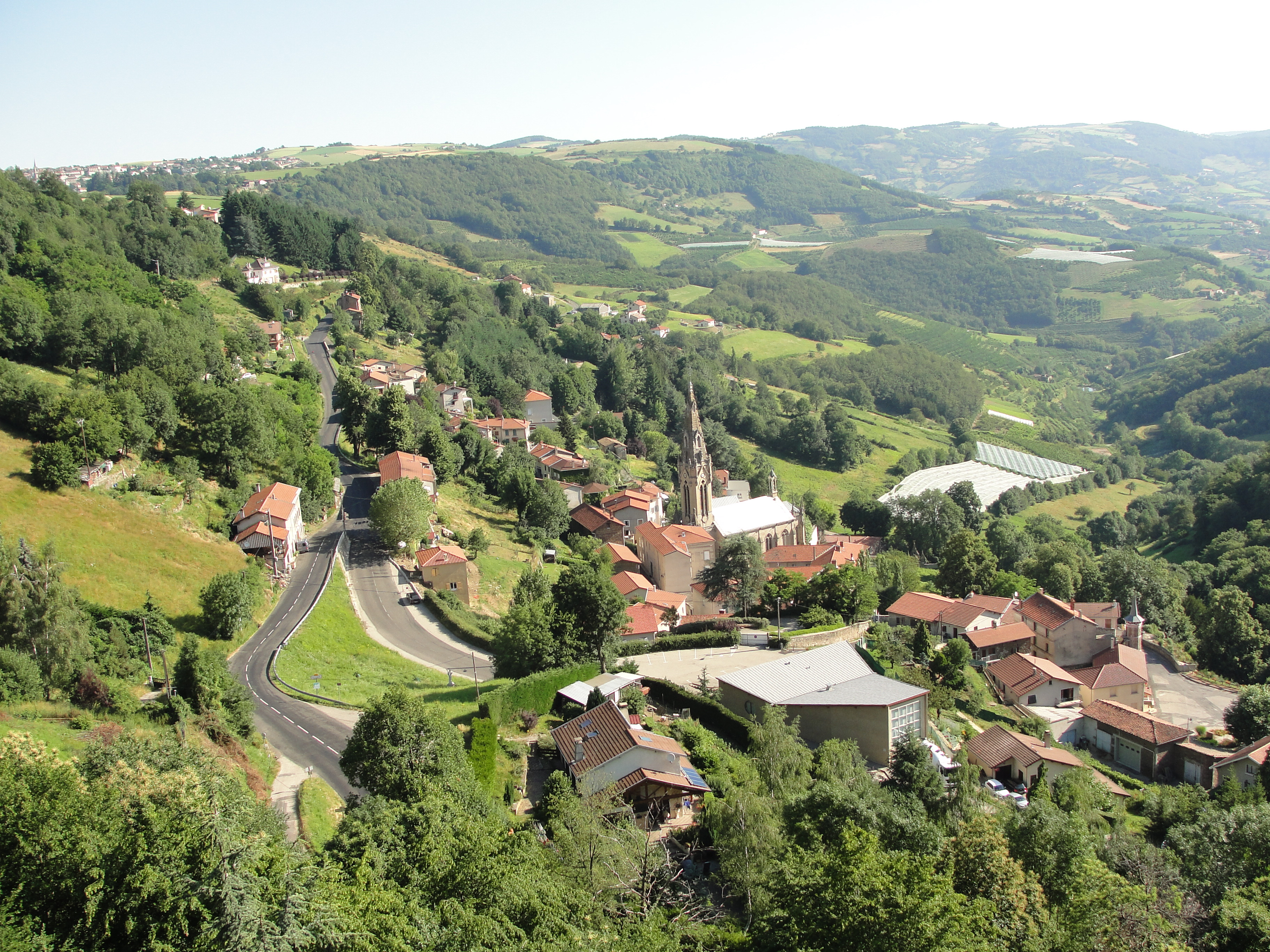 Valfleury (Loire), depuis le rosaire surplombant le village. Basilique et salle des fêtes ressortent nettement.